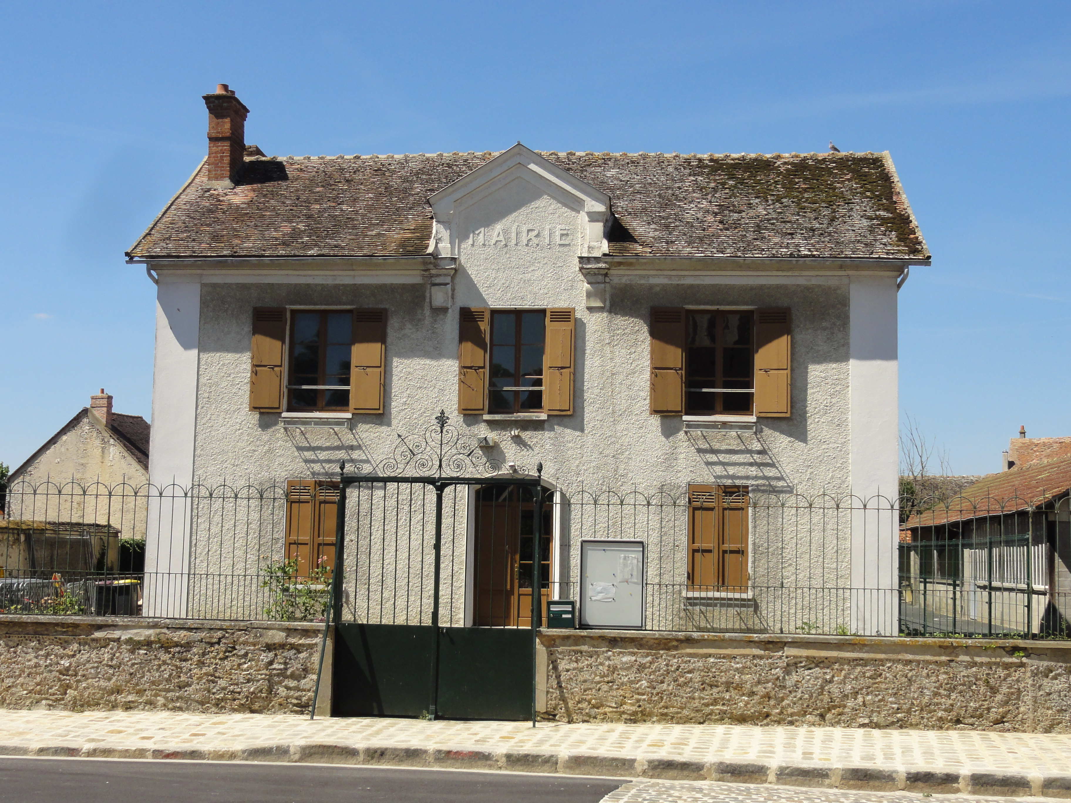 Ancienne mairie, rue du Cloître.